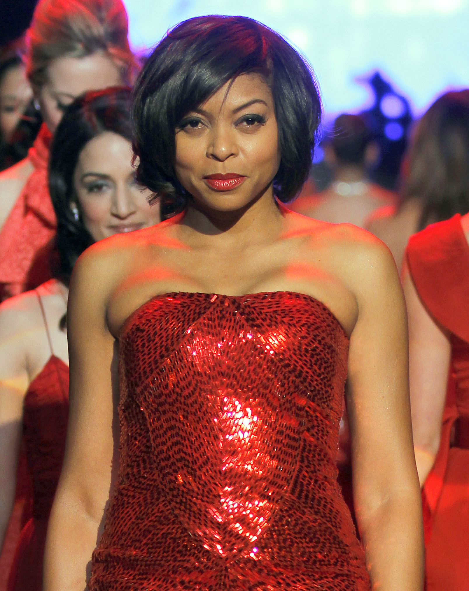 Taraji P. Henson in Oscar de la Renta 2011.